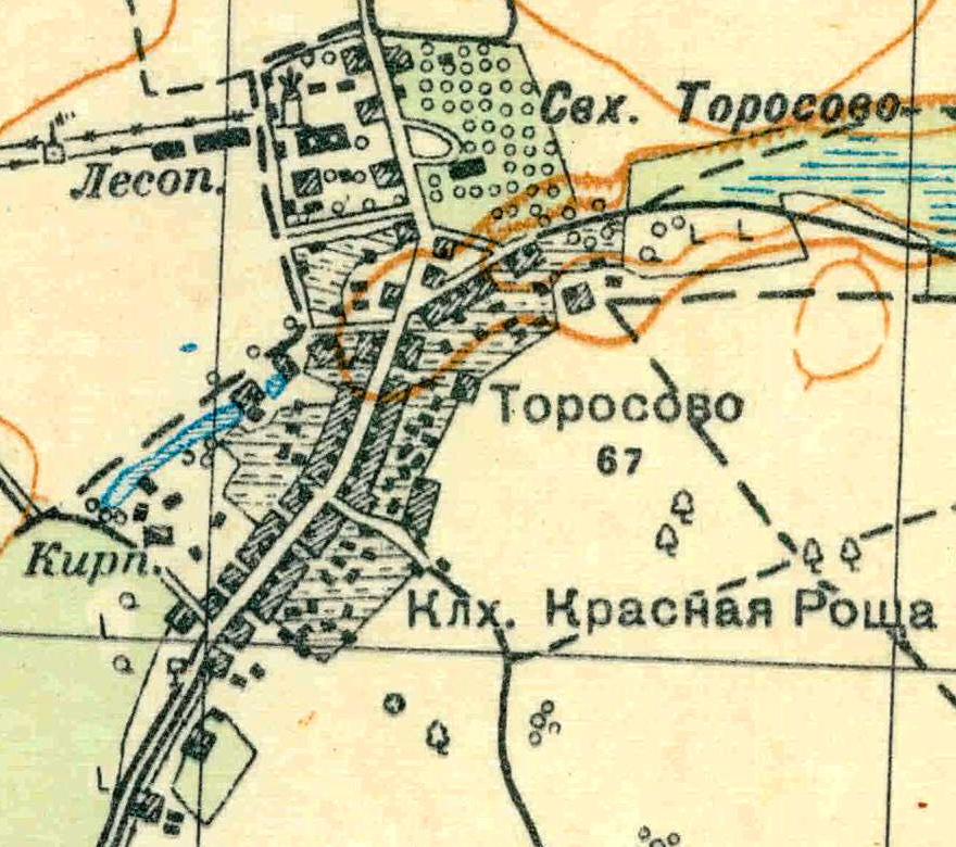 Топографическая карта Ленинградской области, квадрат О-35-24-А-в (Торосово), деревня Торосово